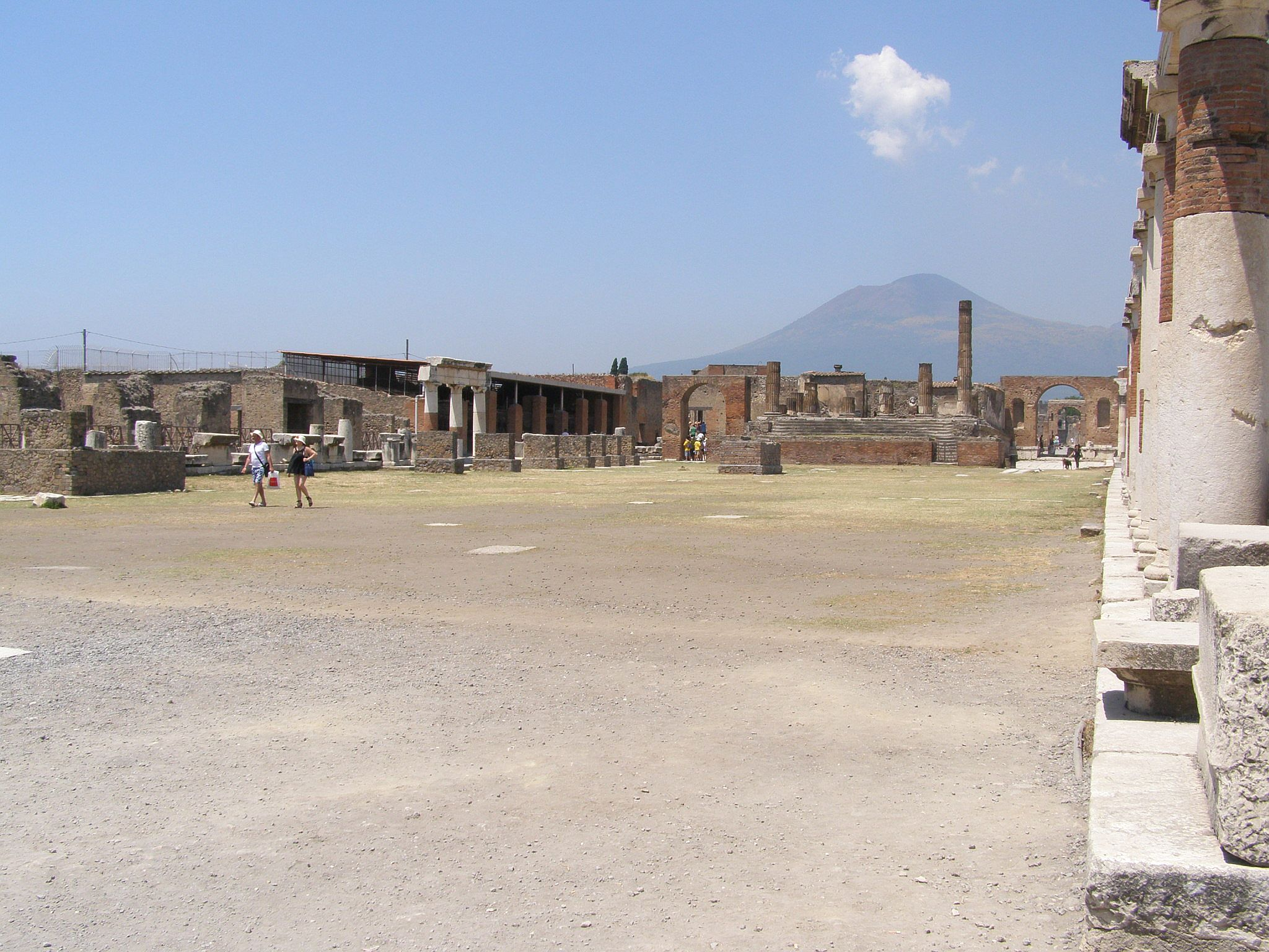 Fórum v Pompejach